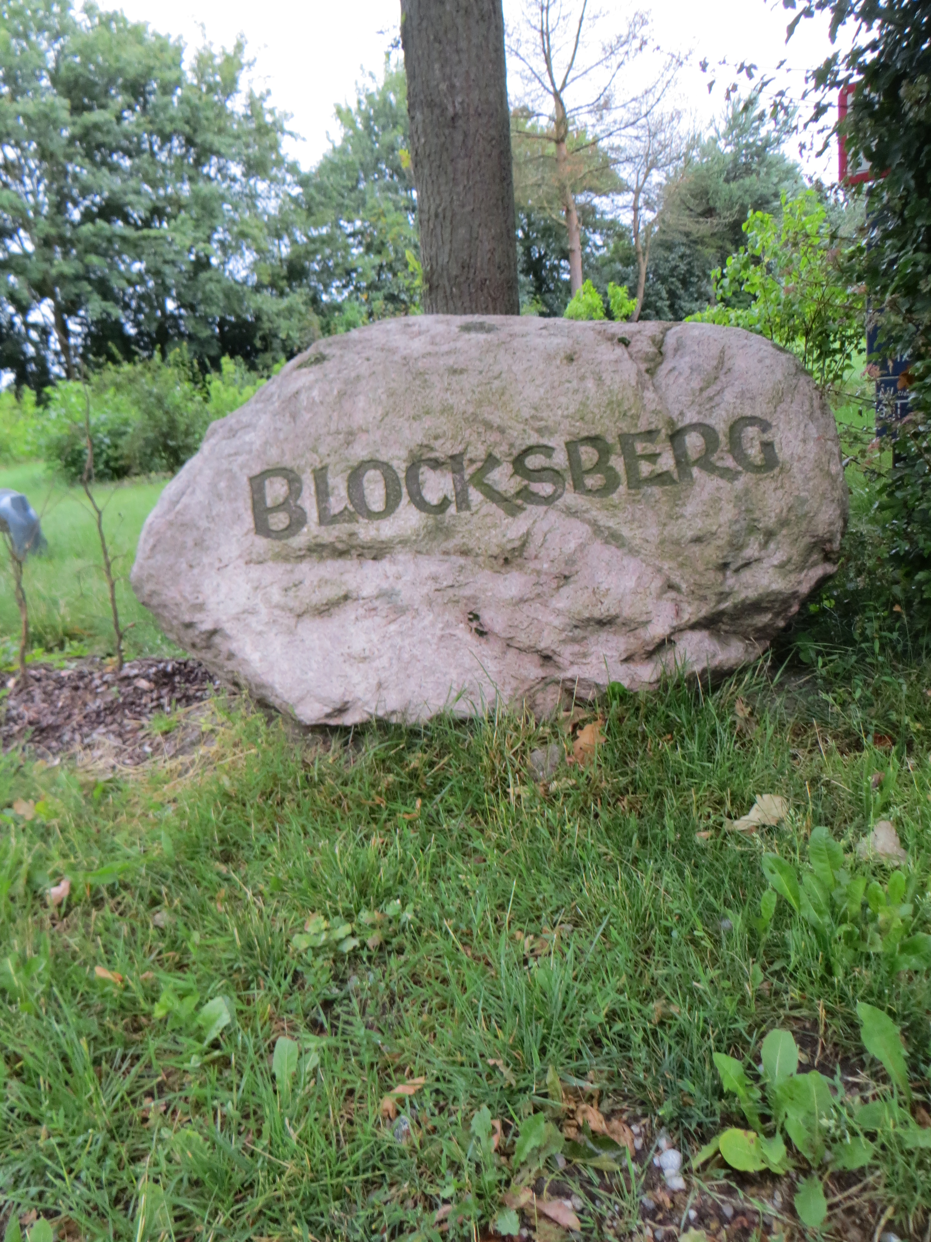 Blocksberg-Stein beim Hof Blocksberg, Bild 02